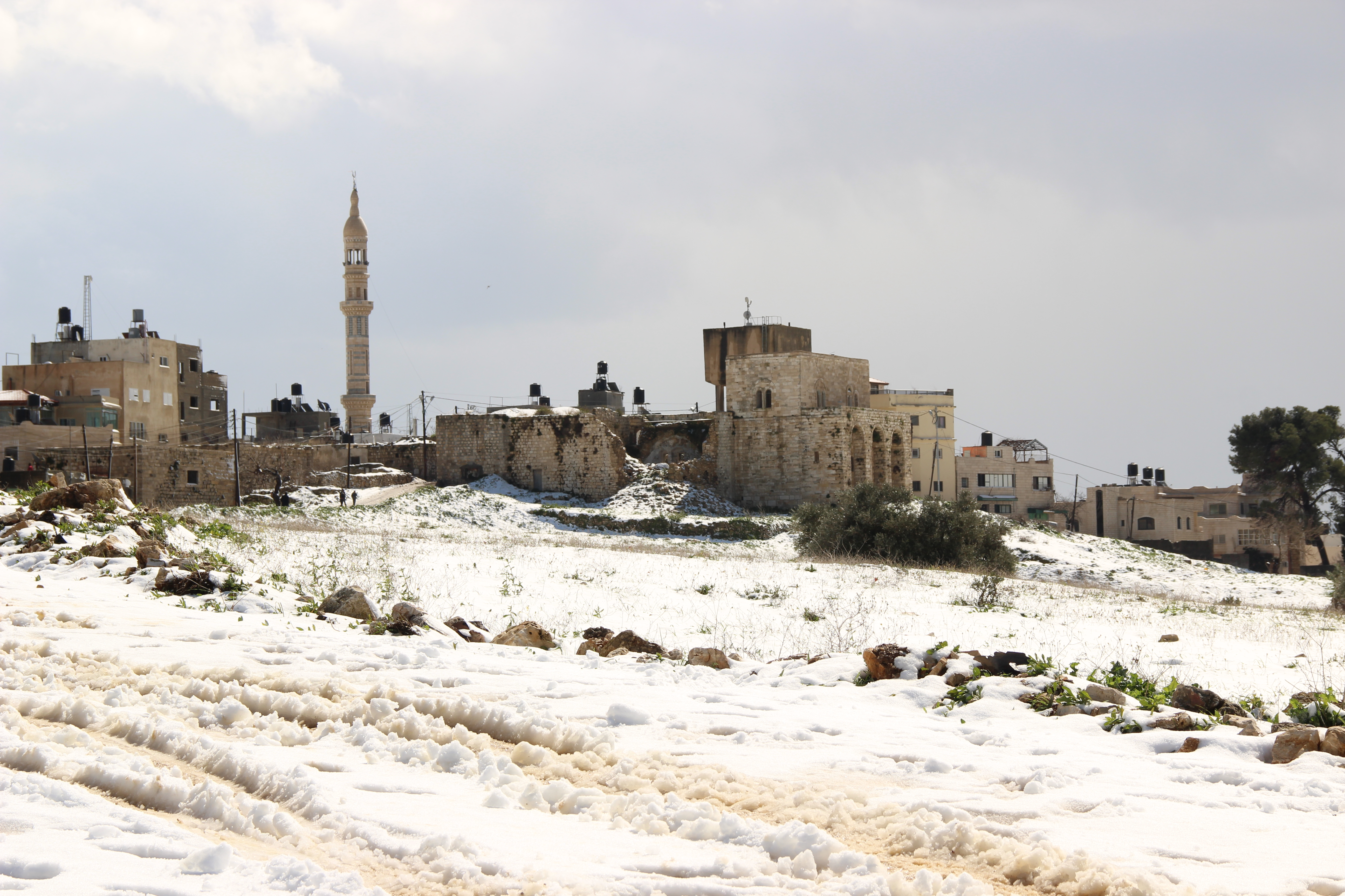 البلدة القديمة من قرية بيتللو ,مدينة رام الله,فلسطين